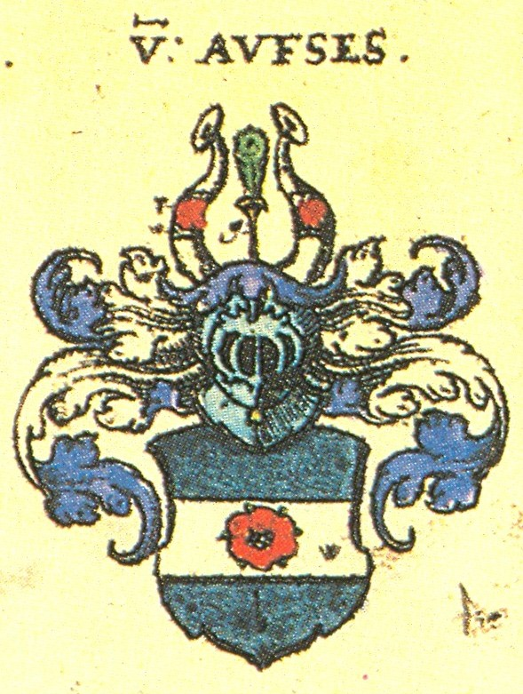 Ritterschaft und Adel in Franken von Aufses